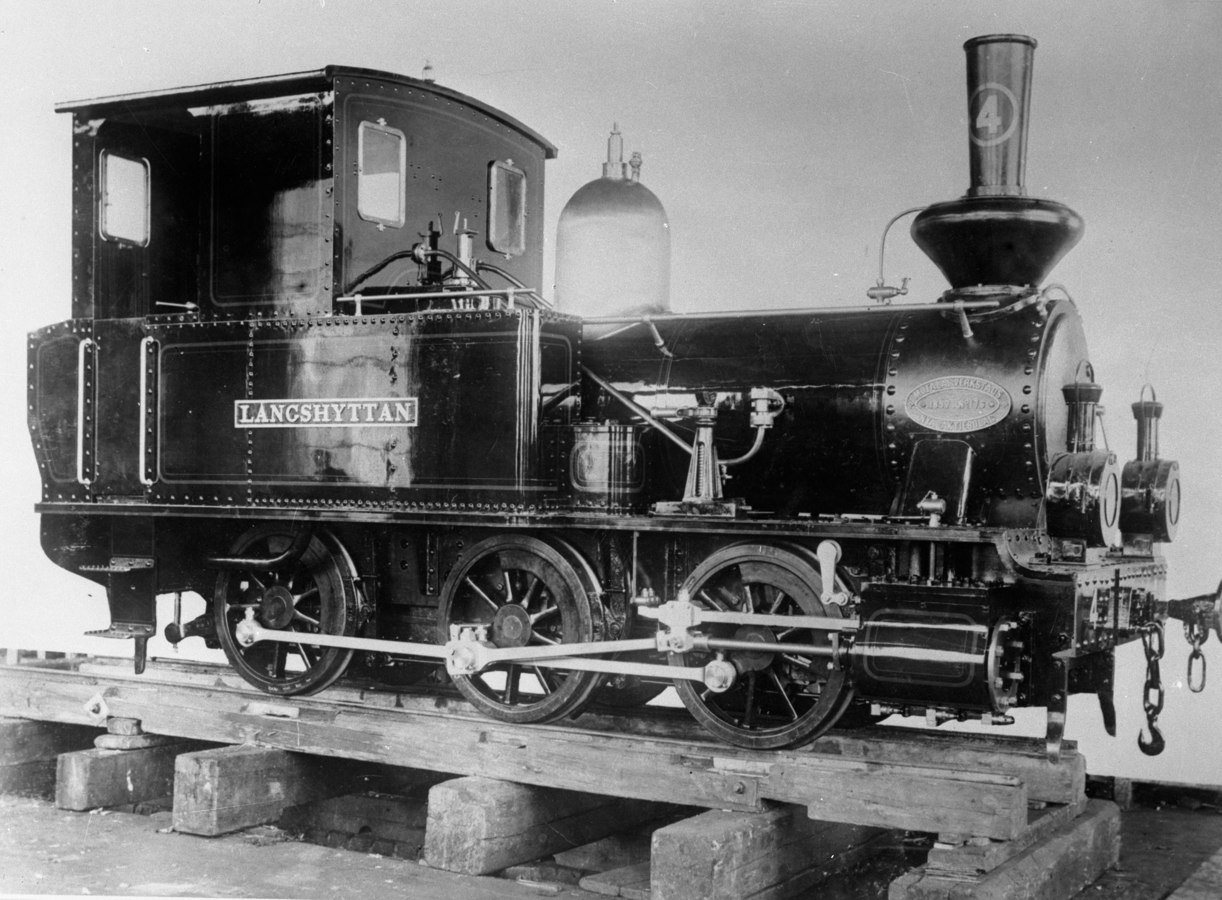 Leveransfotografi av lokomotivet BLJ 4 "Långshyttan". Loket är idag bevarat av Museiföreningen Stockholm-Roslagens Järnvägar (SRJmf) och används i museitrafik på Upsala-Lenna Jernväg.